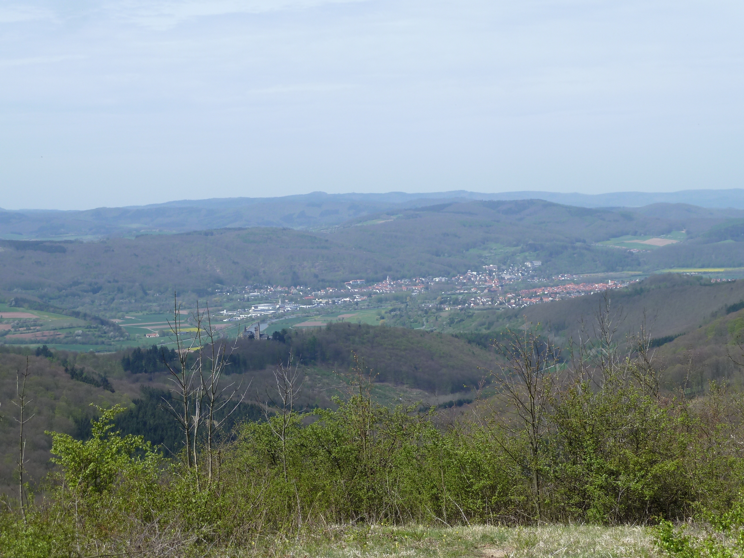 Gobert, Blick von der Schönen Aussicht nach Nordwesten (im Werratal Bad Sooden-Allendorf, dahinter das Soodener Bergland und im Hintergrund der Kaufunger Wald)